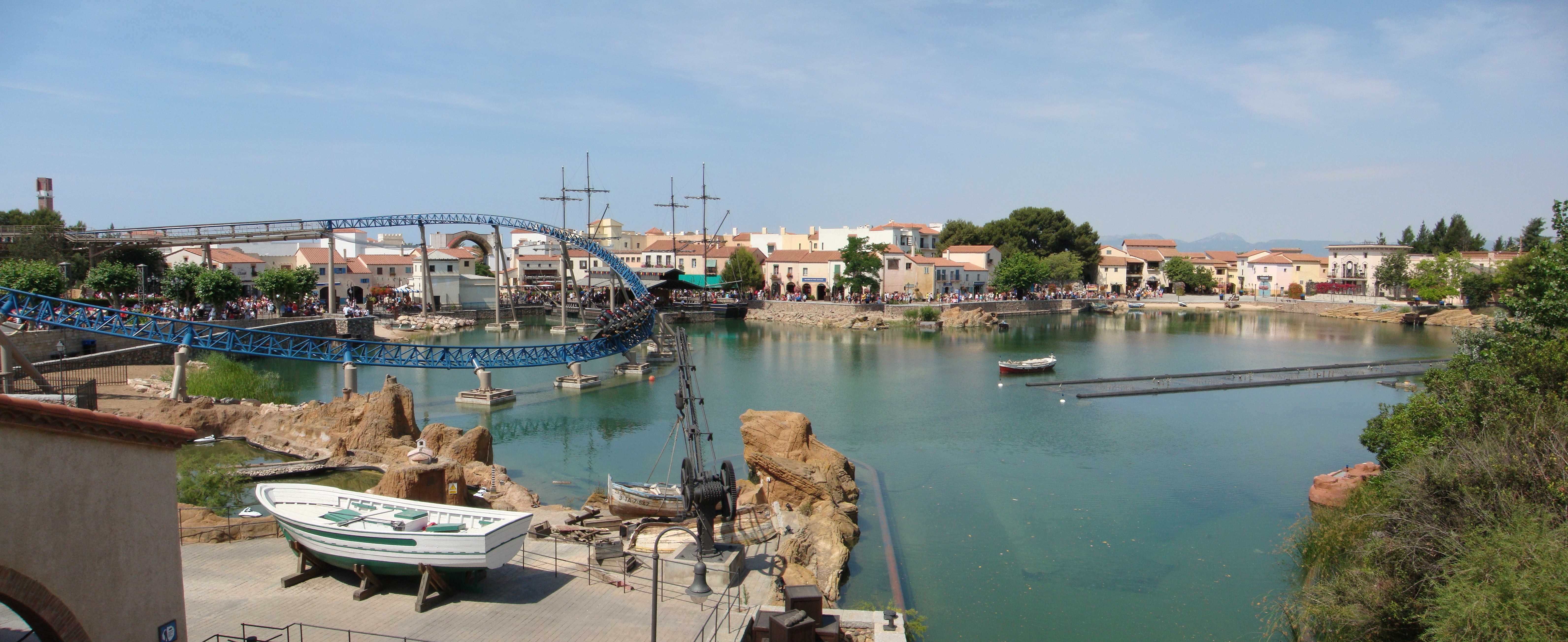 Foto de formato panorámico de la entrada del parque. Mediterránea con el carro del Furis Baco pasando y la gente entrando al parque una mañana soleada de verano.